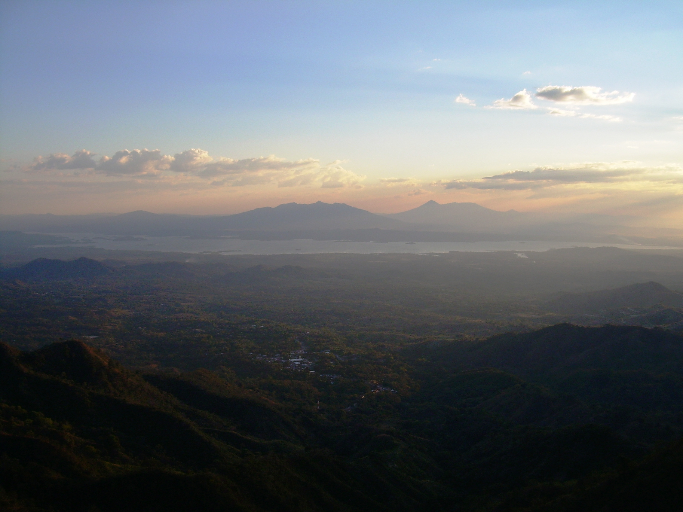 Lago de Suchitlán (Suchitoto), Cerro de Guazapa, casco urbano de Dulce Nombre de María y volcán de San Salvador